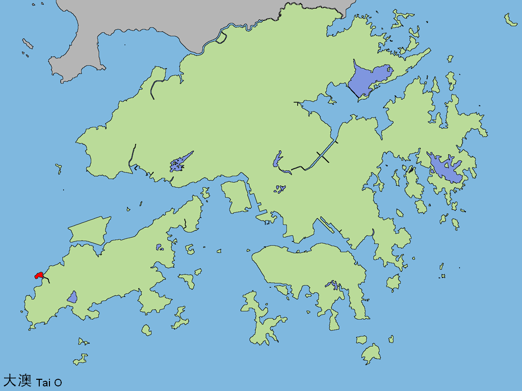 中文（香港）: 大澳。